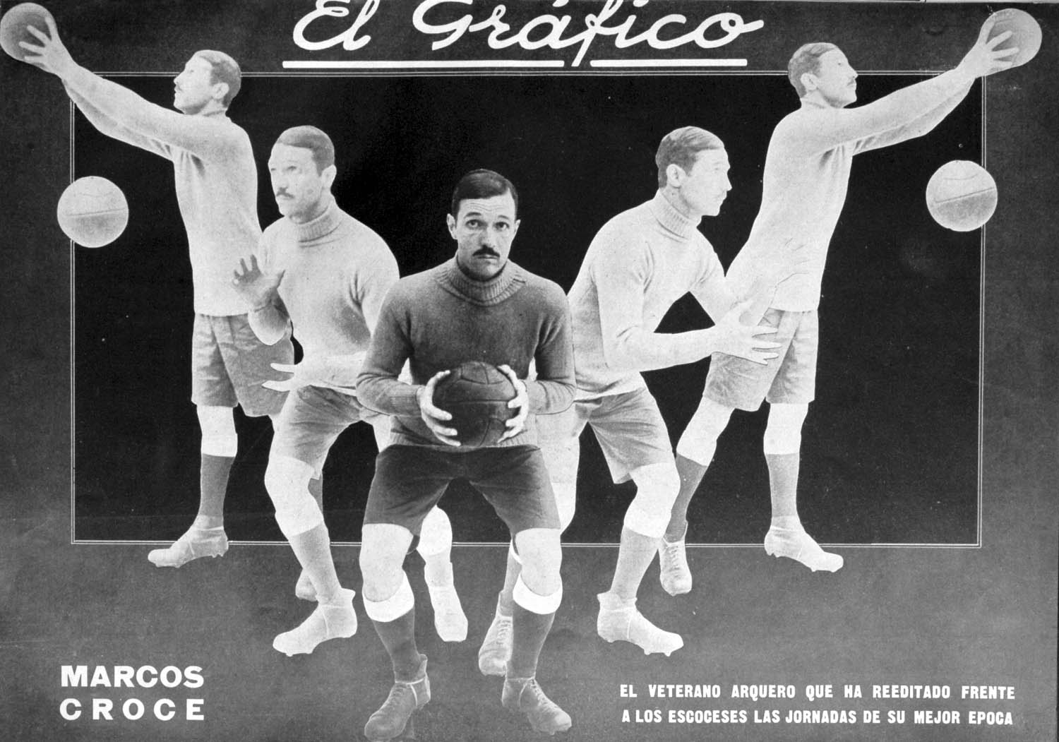 El Grafico del 26 de Mayo de 1928. Edicion 464